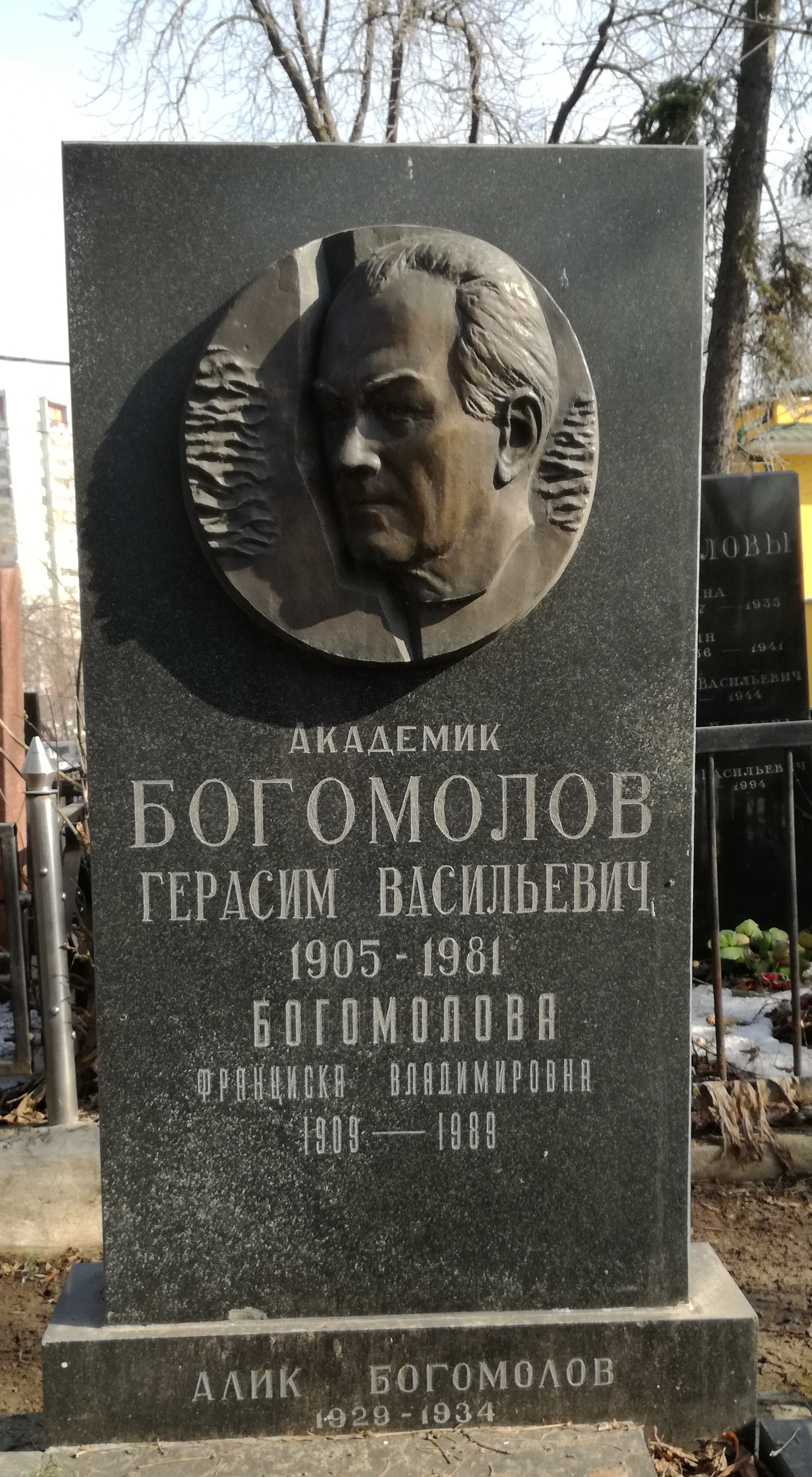 Даниловское кладбище